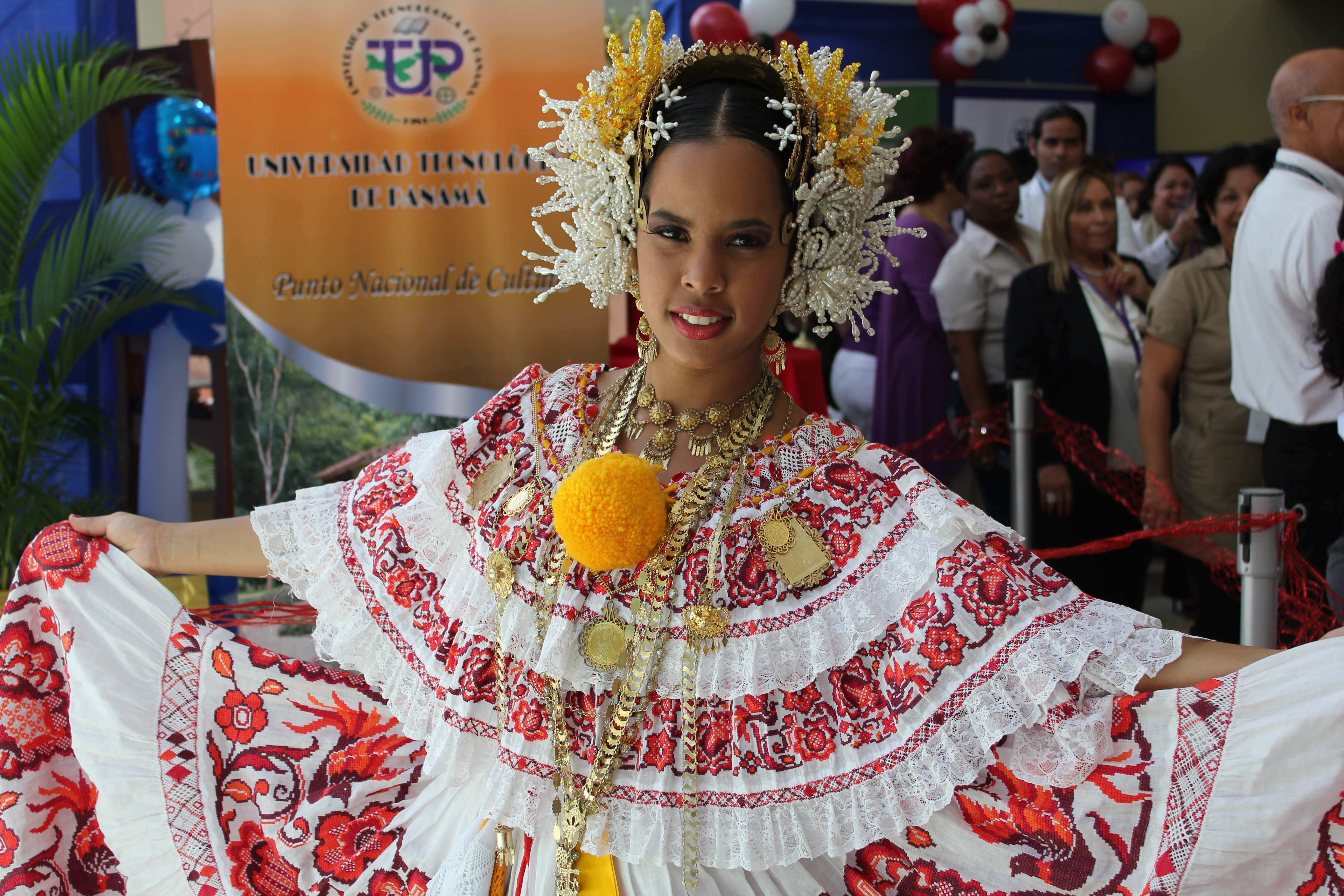 La Pollera: traje típico de Panamá, bordada con la técnica del marcado en color rojo.